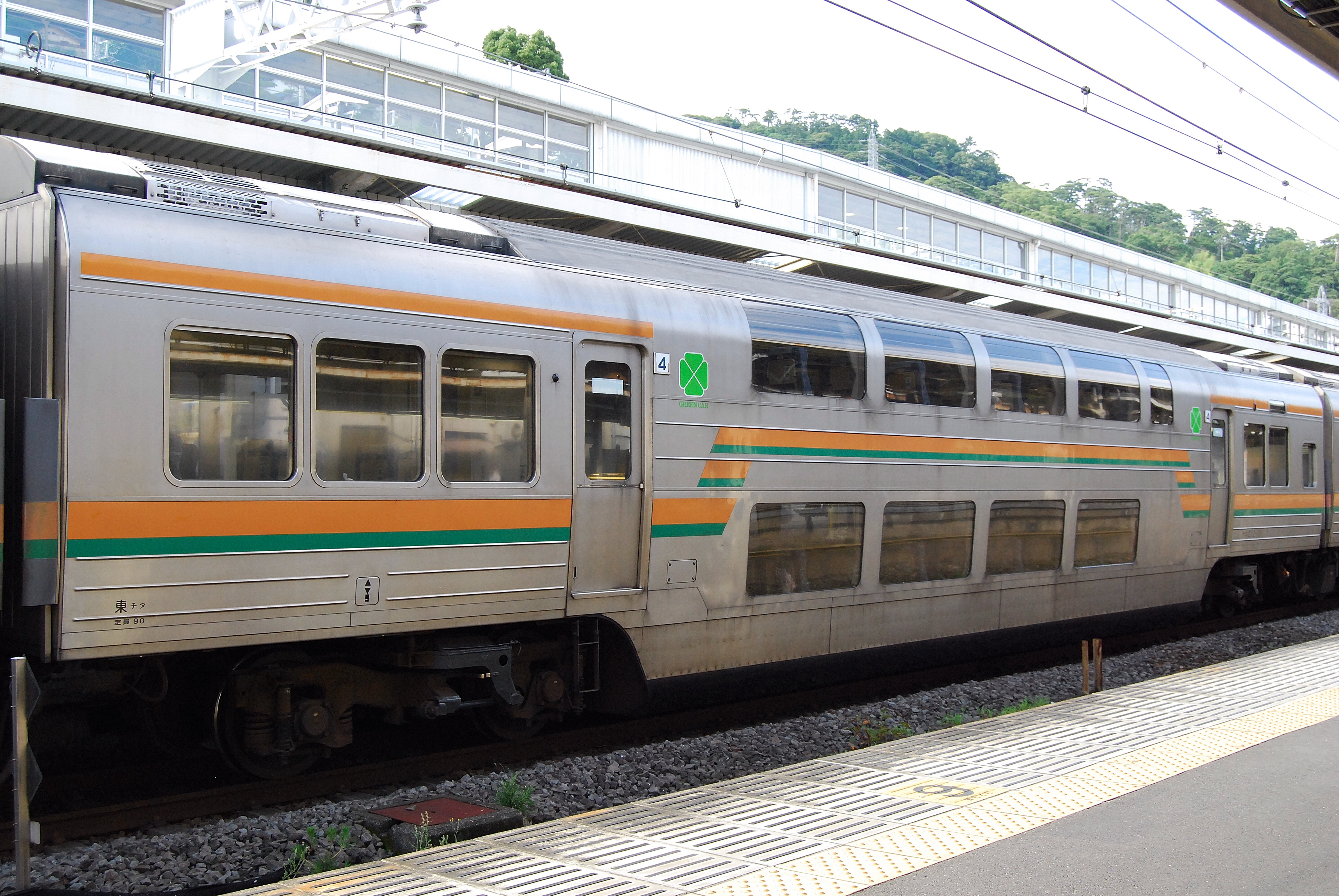 サロ212-101（熱海駅）